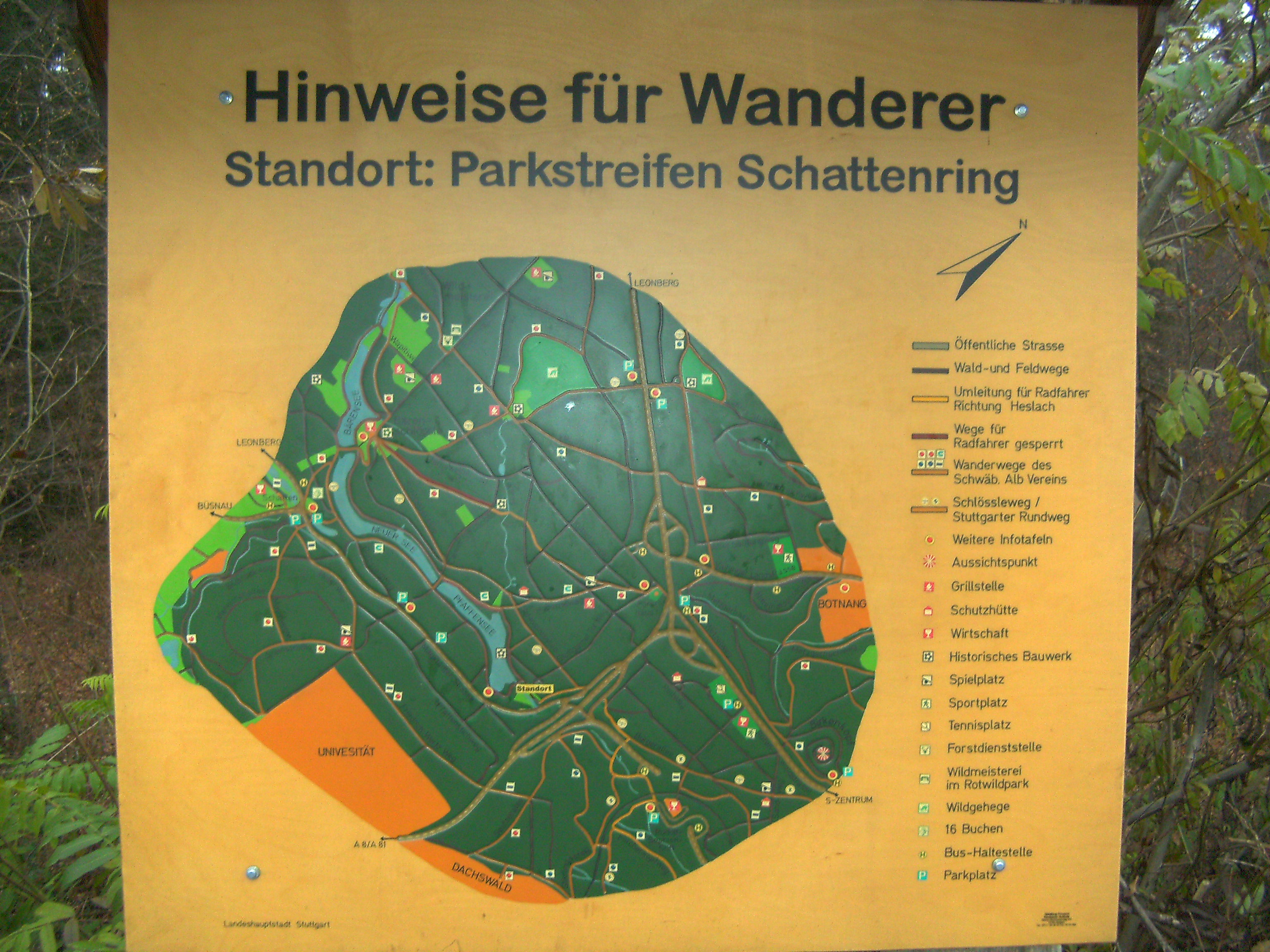 Infotafel, Parkseen im Paffenwald Stuttgart, Bereich des NSG „Rotwildpark bei Stuttgart“. Wasserversorgung und Parkgebiet beim Bärenschlössle.